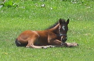 Foto gemaakt door Fruggo, nabij Midwolde